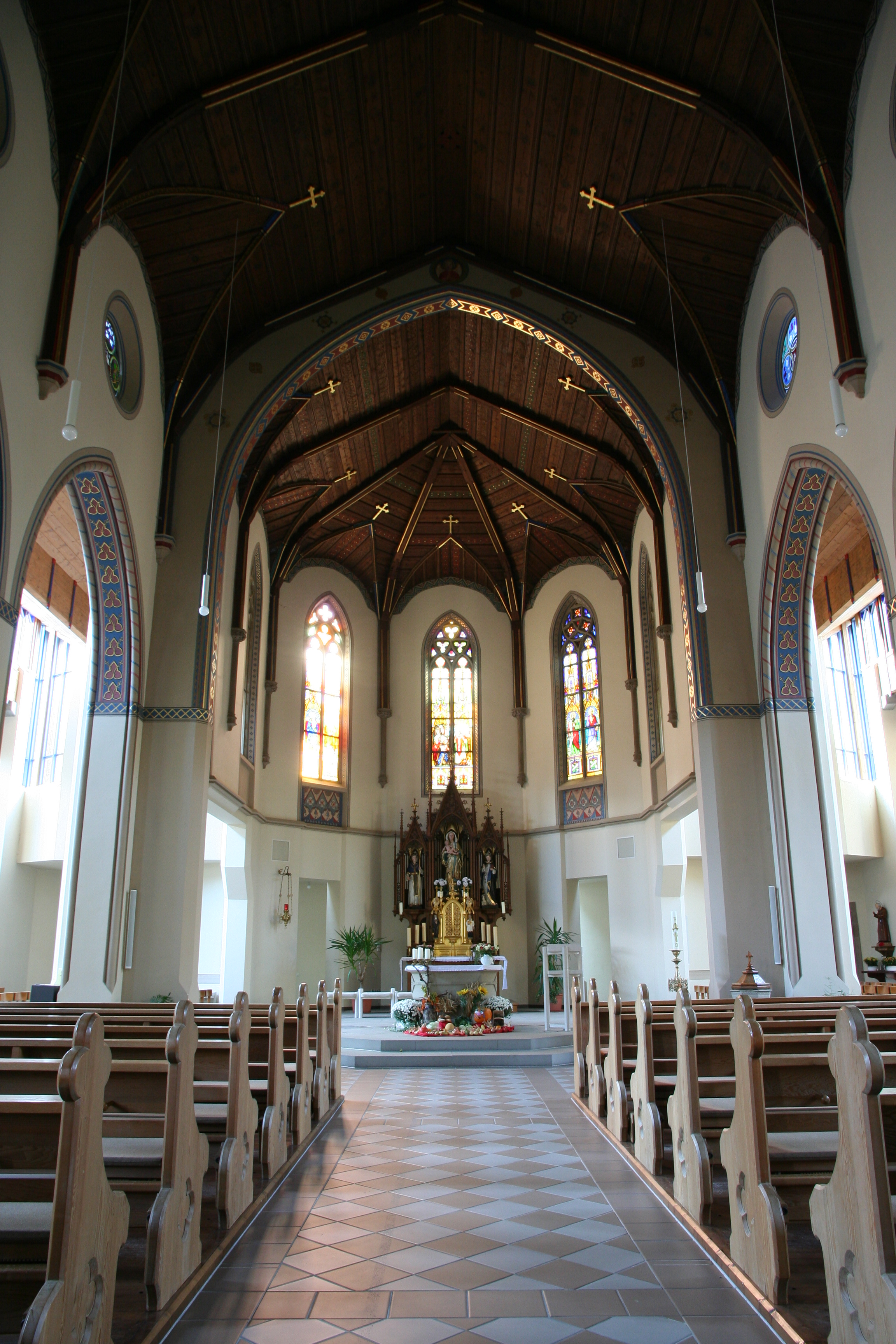 Römisch-katholische Pfarrkirche St. Bonifatius Bad Wildbad